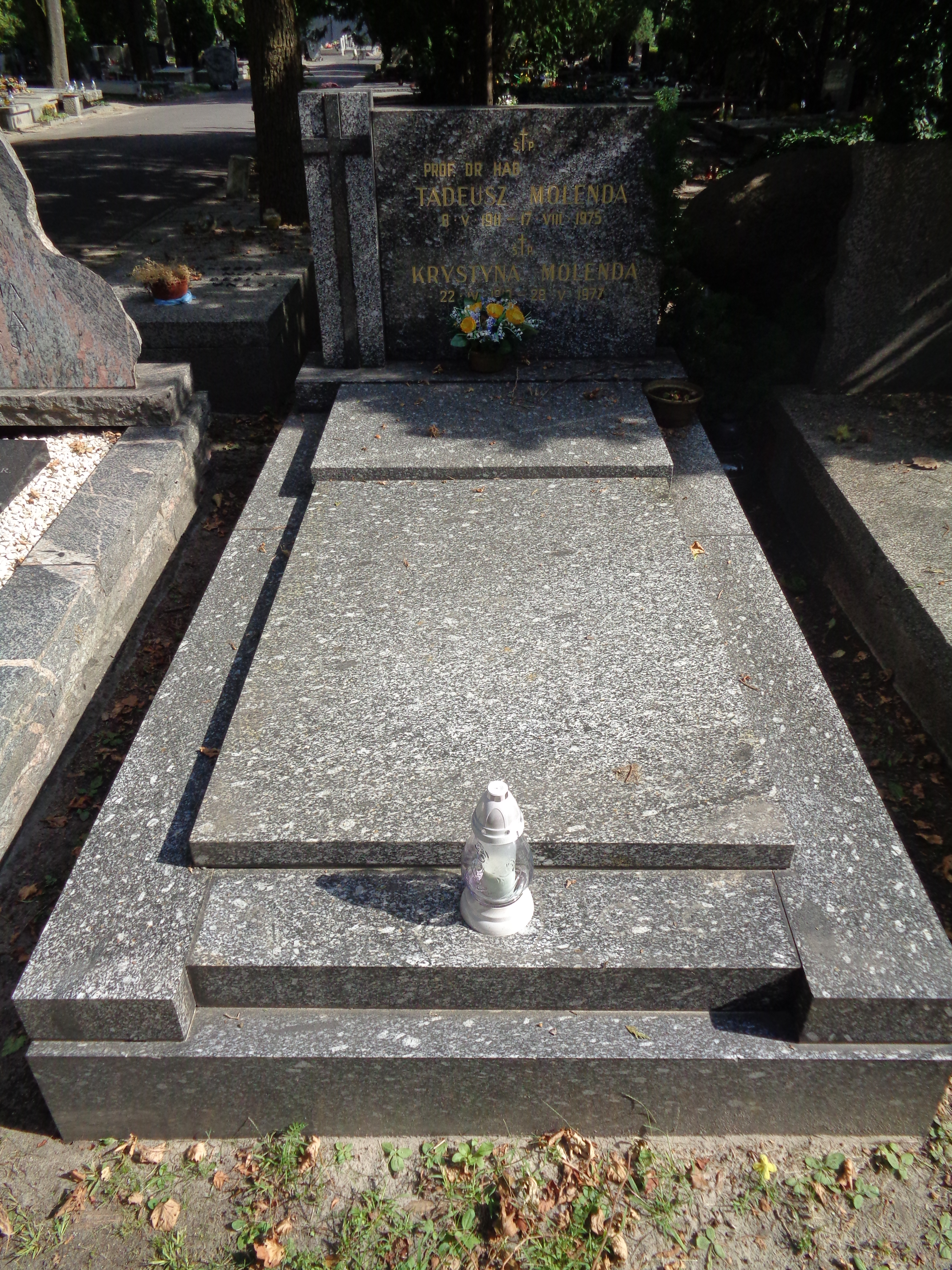 Grób na powązkach wojskowych